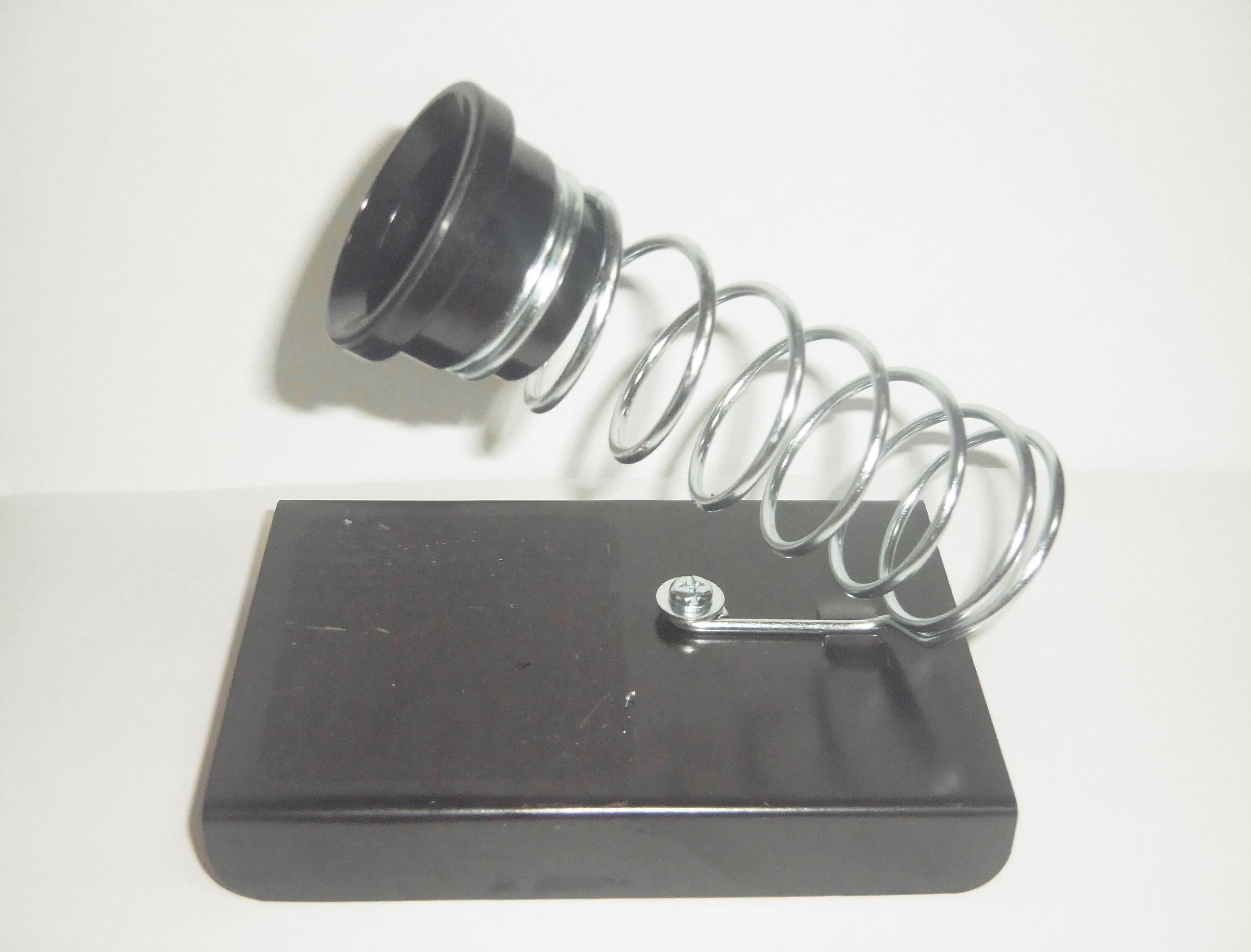 はんだごての台